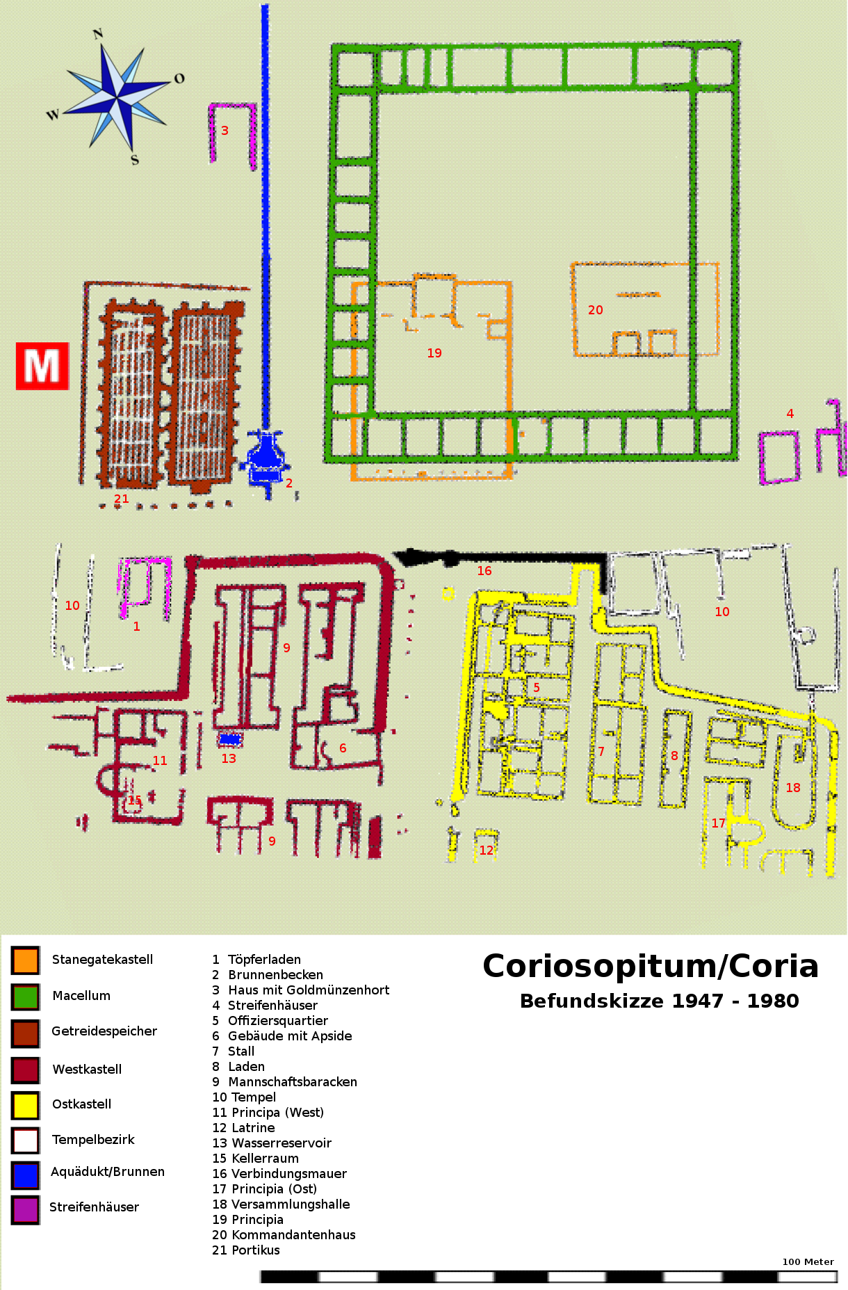 Befundplan der römischen Ausgrabungen in Corbridge (GB) 1947 - 1980